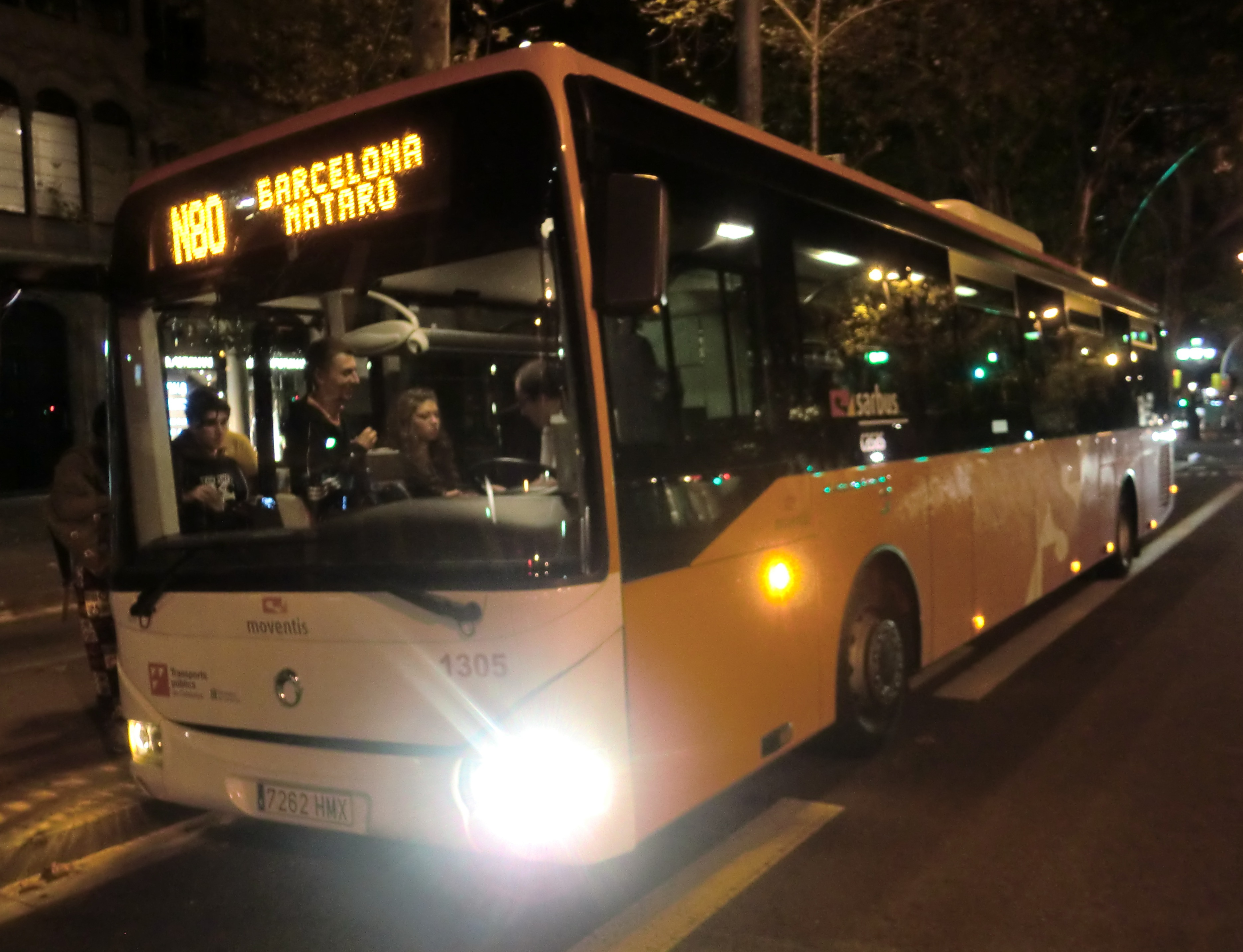 Vehicle de la línia N80 del Servei Interurbà d'Autobusos Nocturns de la Regió Metropolitana de Barcelona a l'inici del recorregut: Passeig de Gràcia, Barcelona.